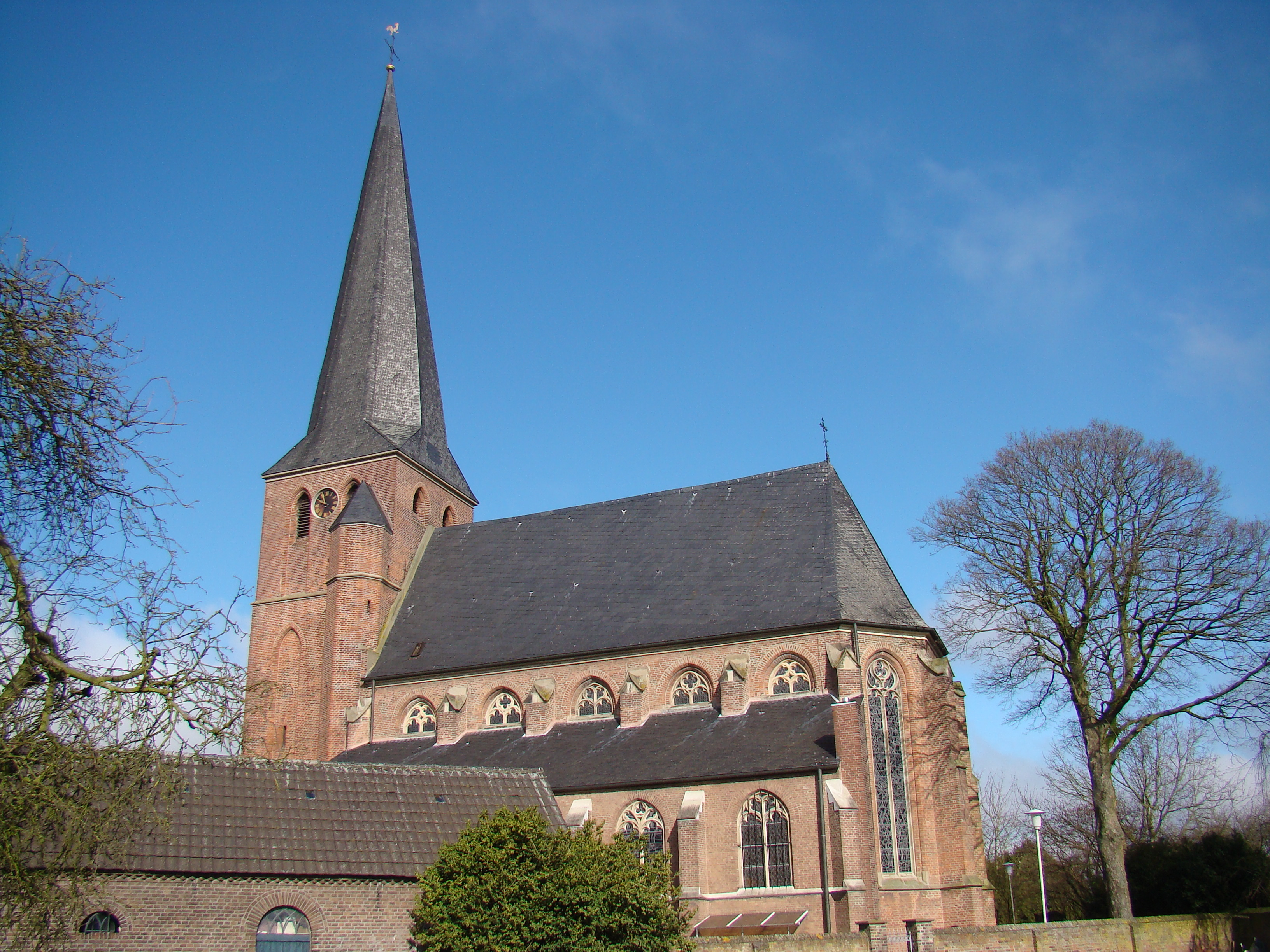 St. Martin in Kleve-Griethausen, Germany